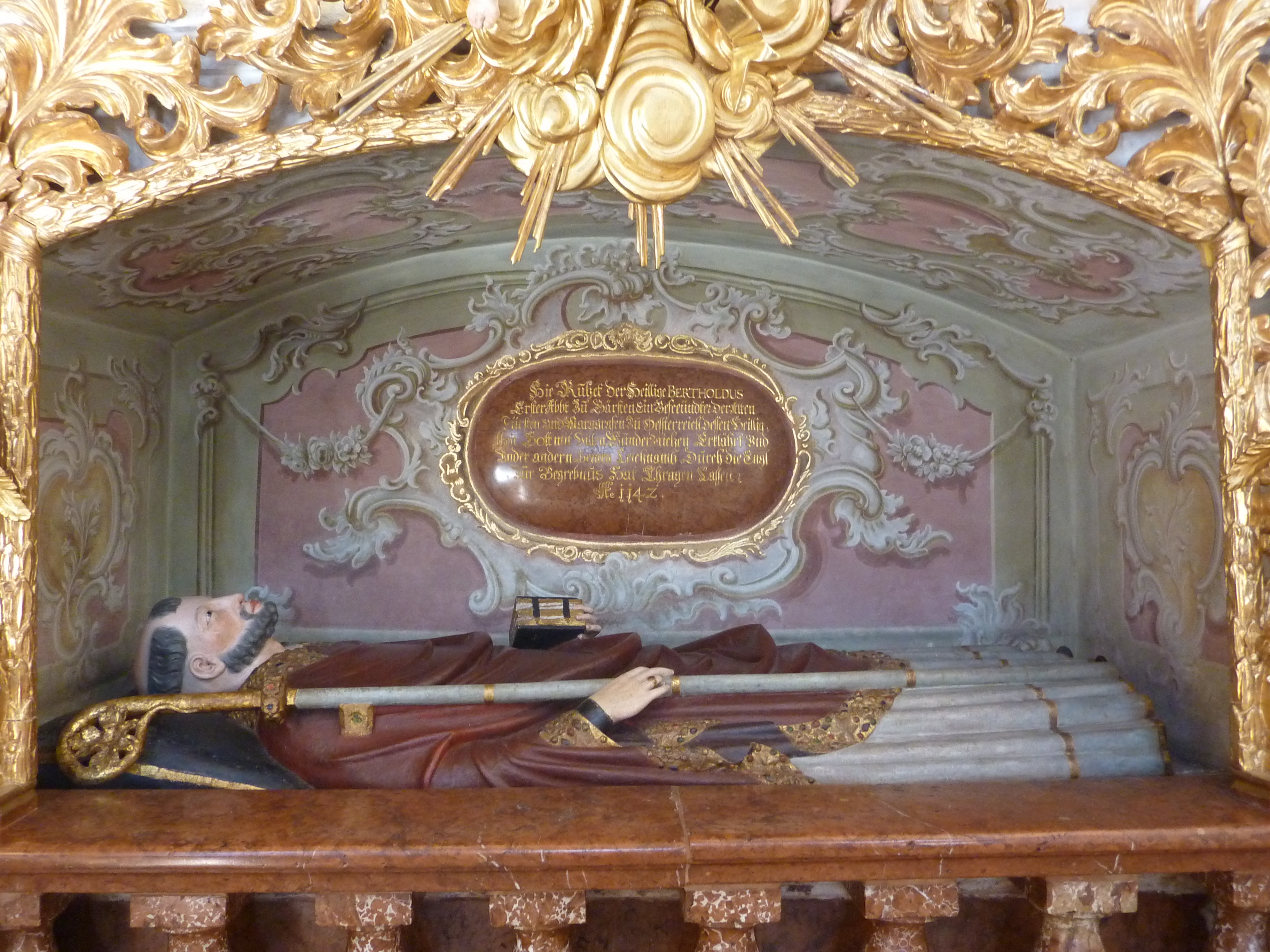 Kath. Pfarrkirche Mariä Himmelfahrt, ehem. Klosterkirche, Am Platzl, Garsten, Oberösterreich - Hochgrab des hl. Berthold in der ersten Seitenkapelle rechts